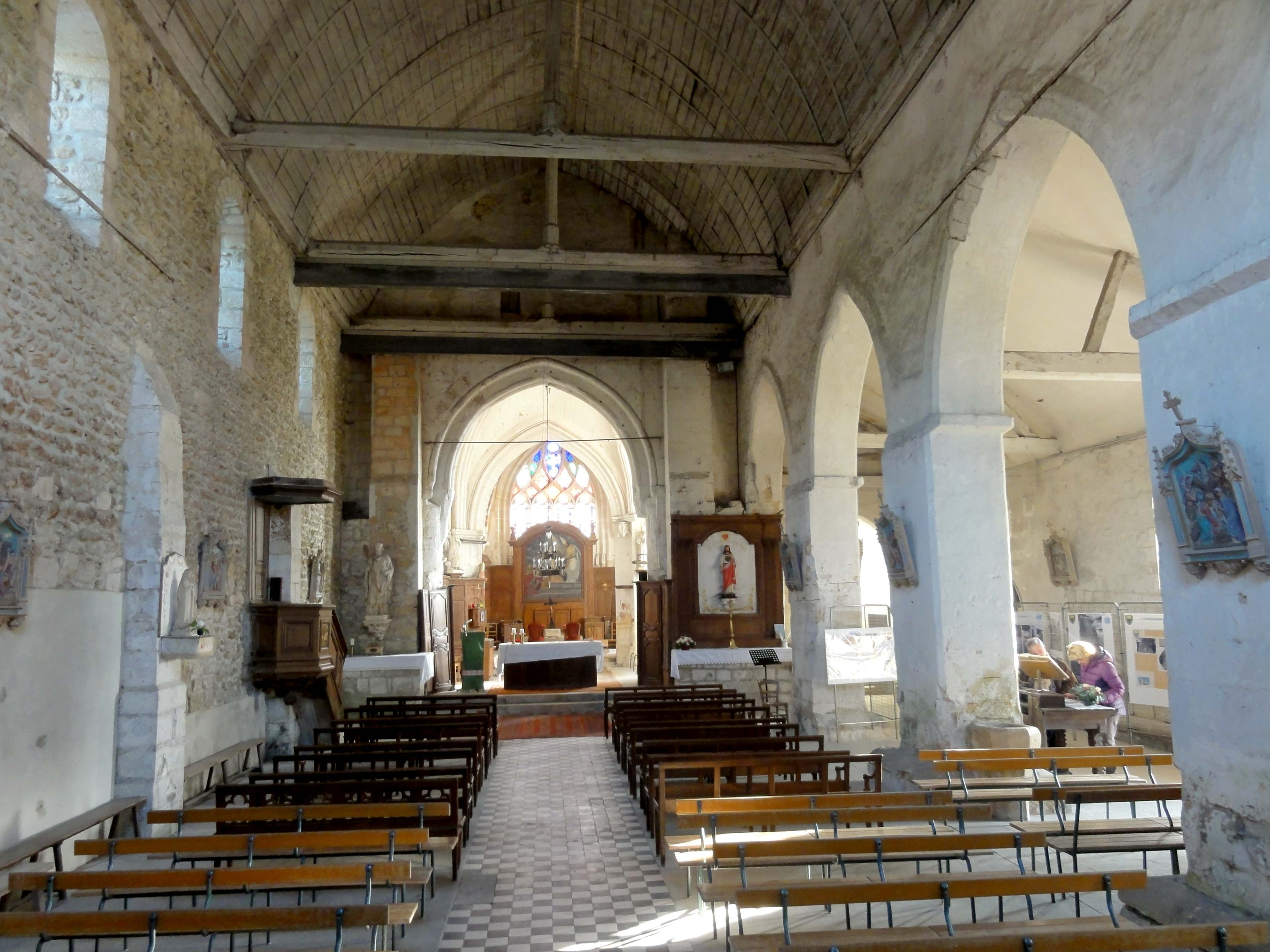 Intérieur de l'église - voir de l'église.